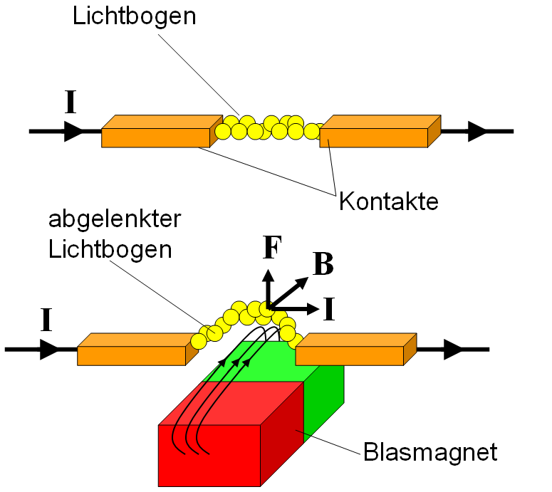 Prinzipielle Funktionsweise eines Blasmagneten zum Funkenlöschen